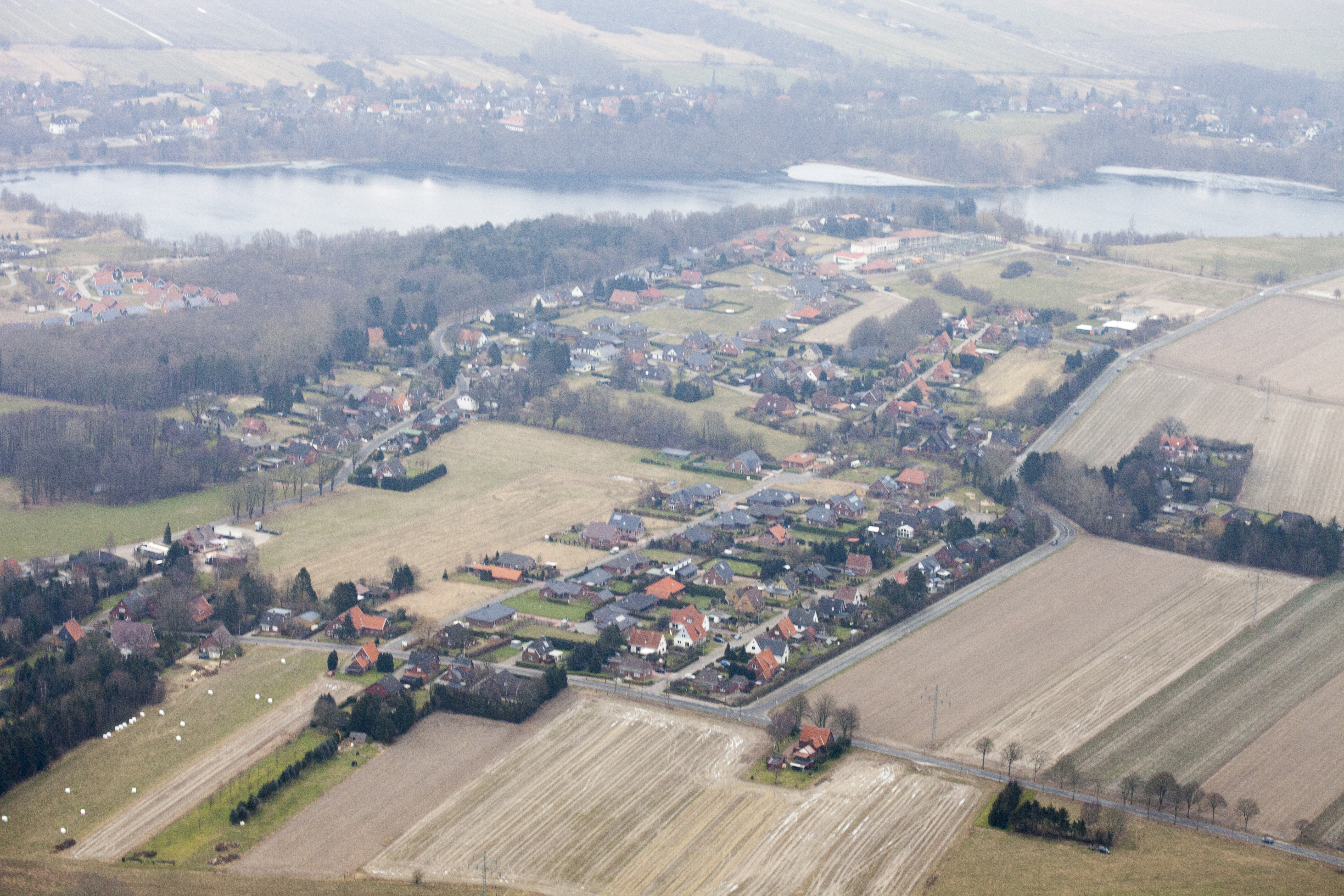 Luftaufnahme: von vorne nach hinten: der Ortsteil Westersode von Hemmoor, der Kreidesee Hemmoor und der Ortsteil Warstade von Hemmoor